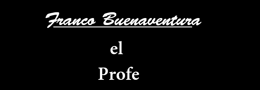 Logo de Franco Buenaventura, el profe. Hecho por mi